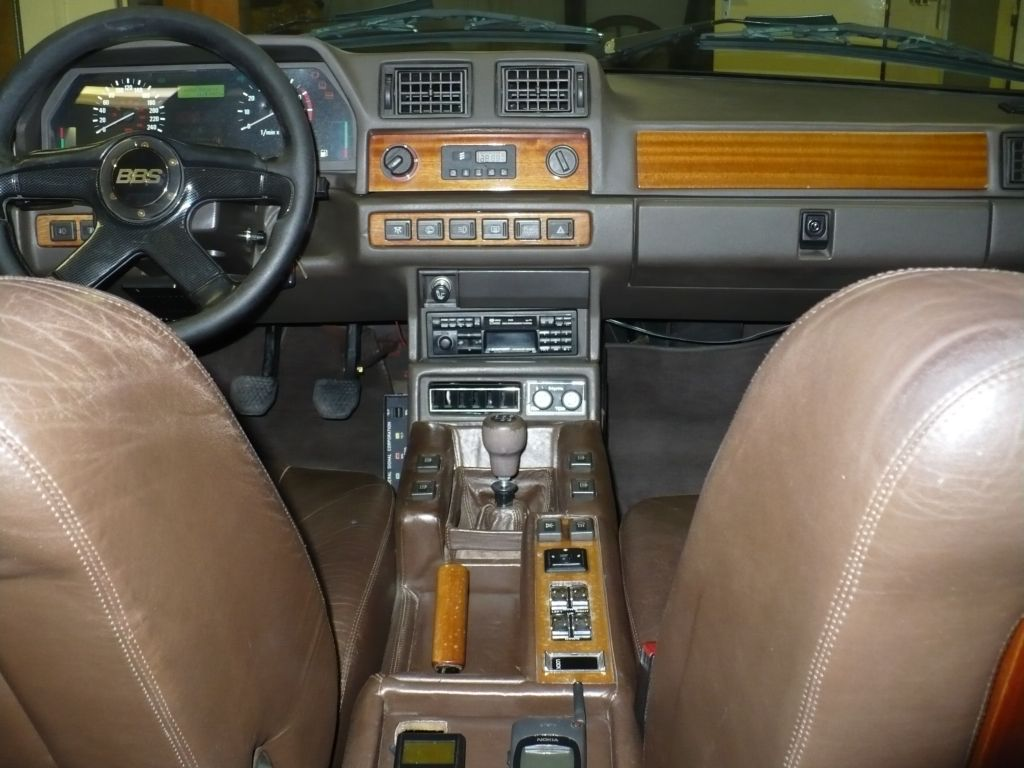 Interiér